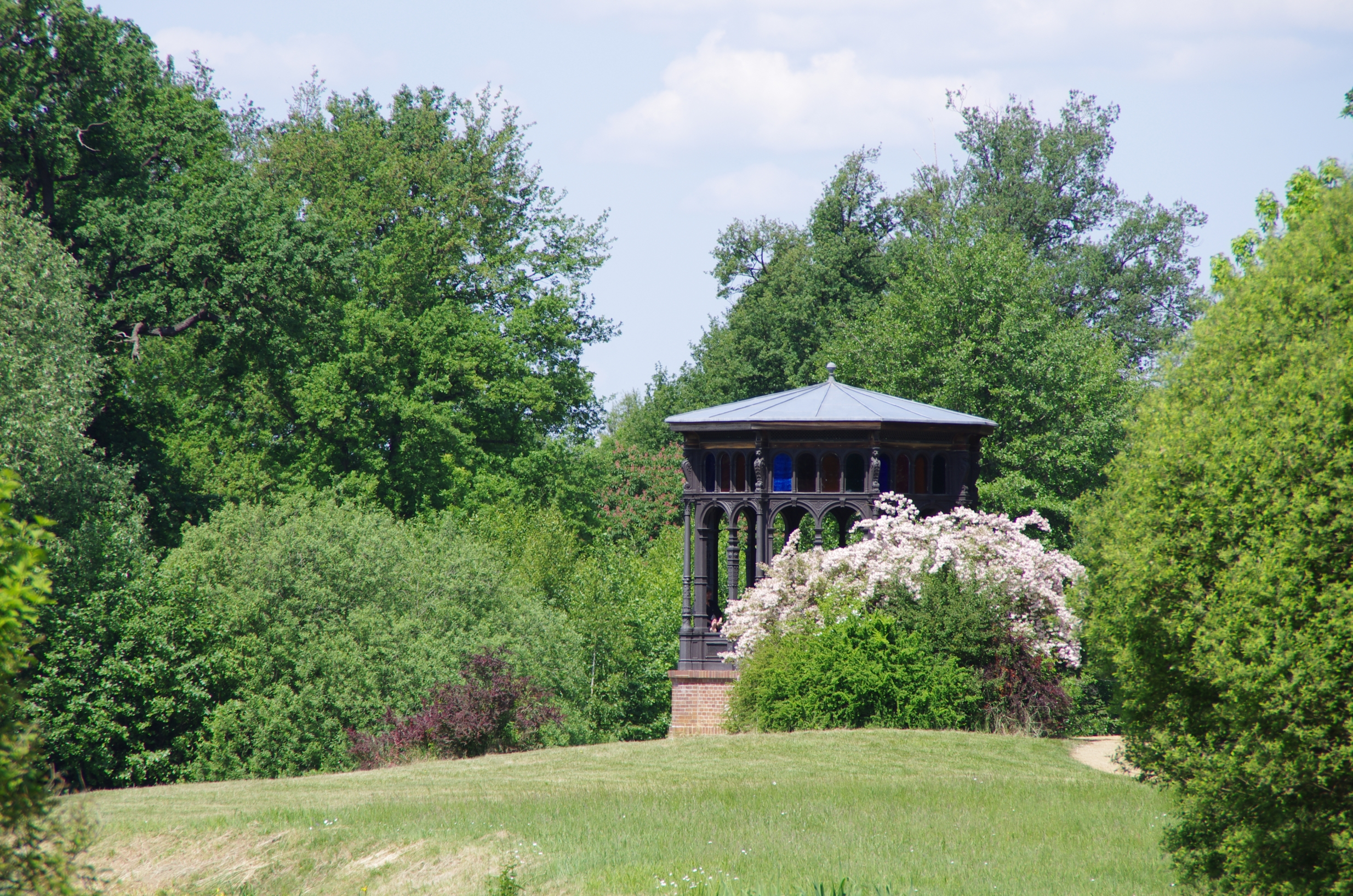 Luckau, Ortsteil Fürstlich Drehna in Brandenburg. Der Park des Schlosses Fürstlich Drehna steht unter Denkmalschutz. Zu sehen ist ein Pavillion im Park.